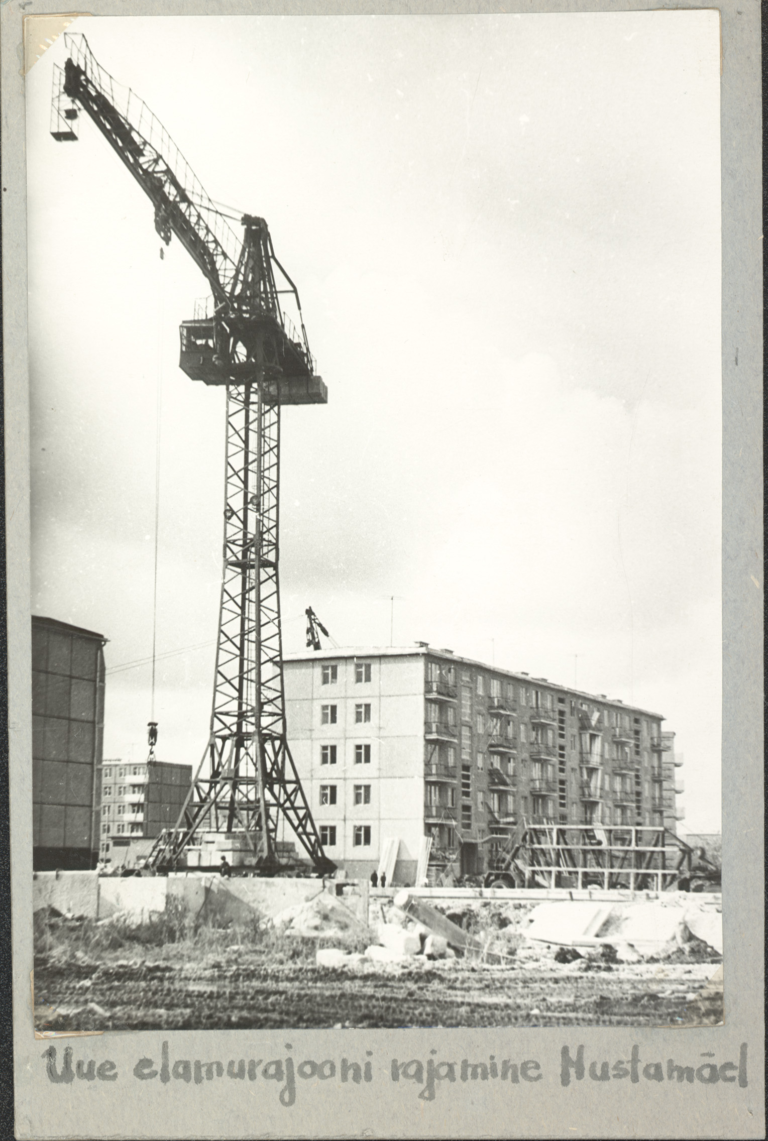 Uue elamurajooni rajamine Mustamäel